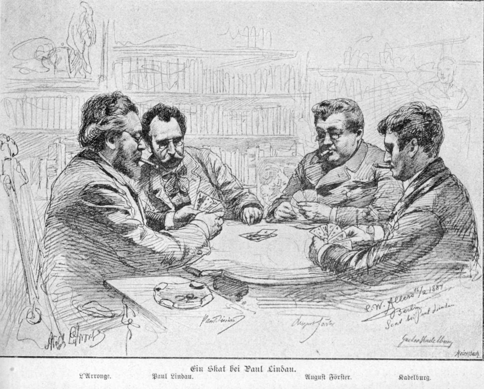 beim Skat-Spiel: Adolph L'Arronge (Dt. Theater Berlin), Paul Lindau (Hoftheater Meiningen), August Förster (Wiener Burgtheater), Gustav Kadelburg (Autor)